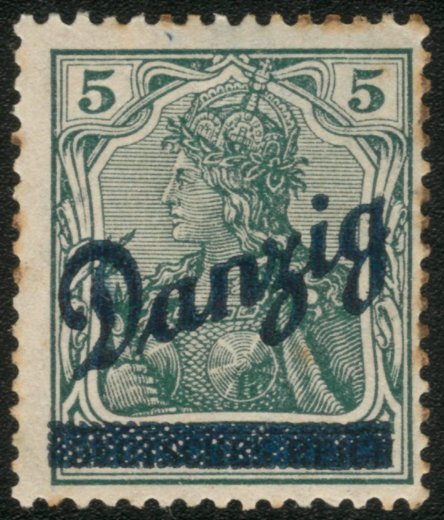 Немецкая почтовая марка Германия с надпечаткой "Данциг". Запечатаны слова "Германский рейх" внизу марки